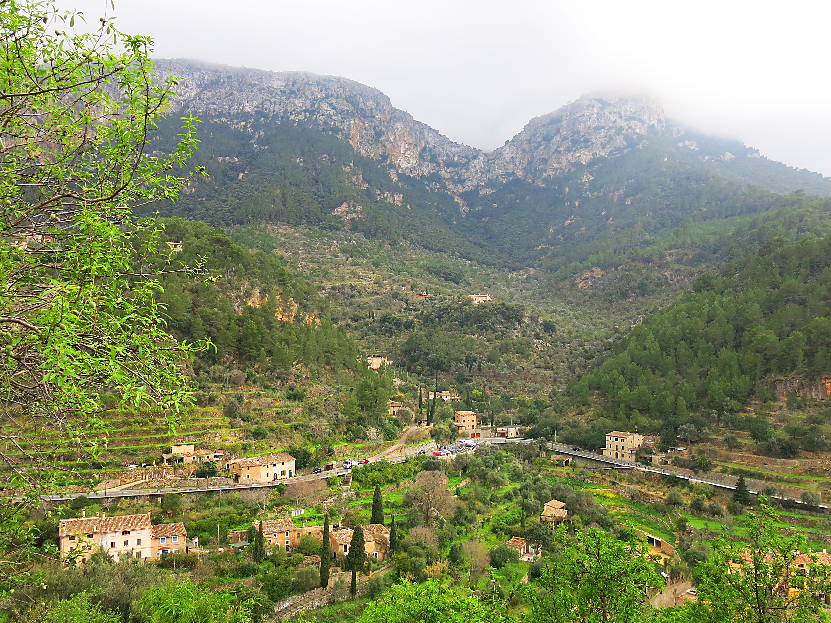 Es Teix This is a photography of a Special Area of Conservation in Spain with the ID: ES5310009. Natura2000 entry, EEA entry